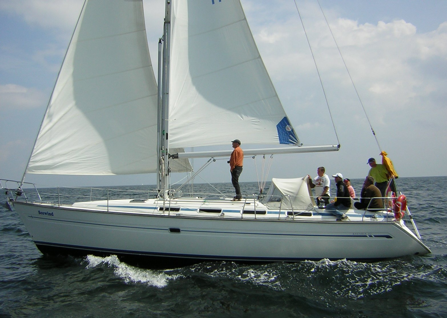 Bavaria 42